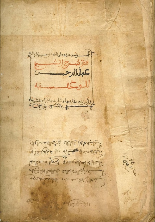 Abderrahmane El Waghlissi (2) شرح المقدمة الوغليسية على مذهب السادة المالكية - عبد الرحمن بن الوغليسي البجائي الزواوي